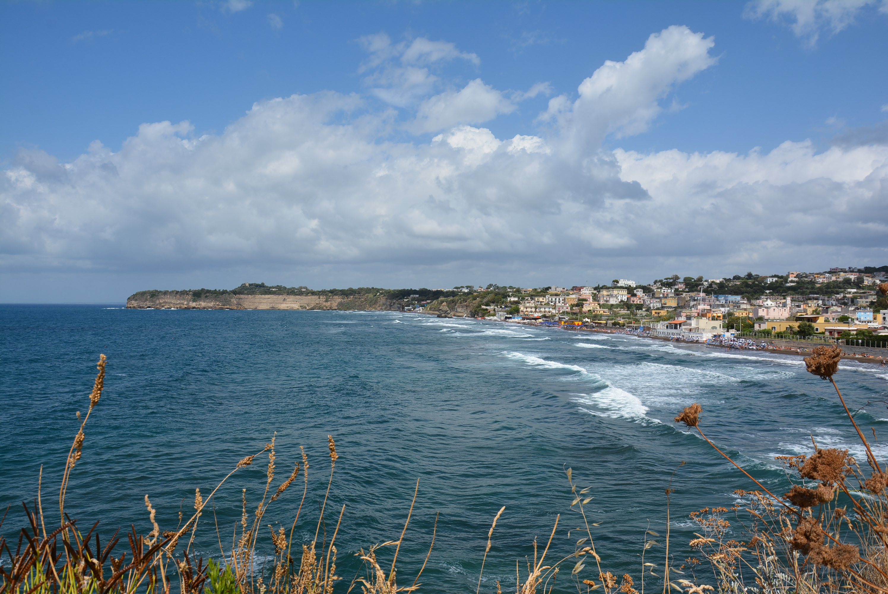 Spiaggia della Chiaiolella